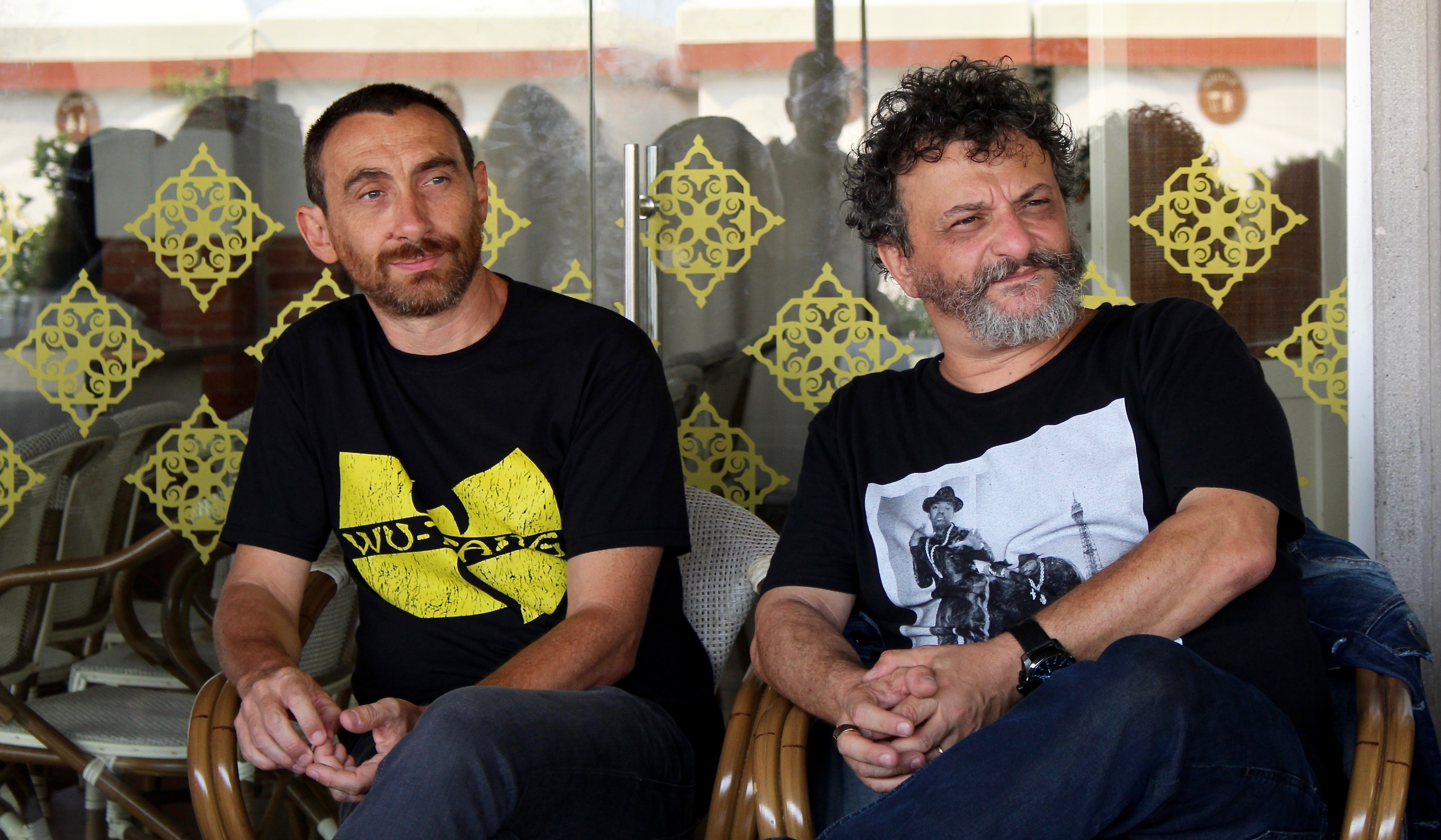 Il duo registico Manetti Bros. in una conferenza durante il Festival di Venezia 2017